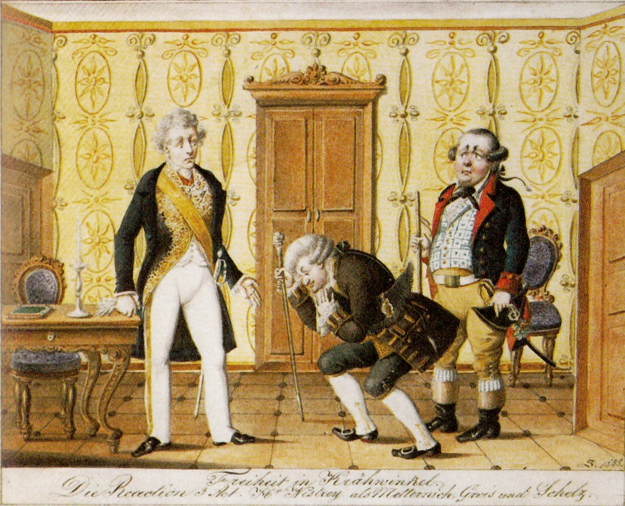 Szenenbild "Freiheit in Krähwinkel" (Die Reaction, 3. Act) mit Johann Nestroy als Eberhard Ultra (in Verkleidung als Metternich), Louis Groh (Bürgermeister), Wenzel Scholz (Klaus). Aquarell, monogr. u. dat. "S. 1848".